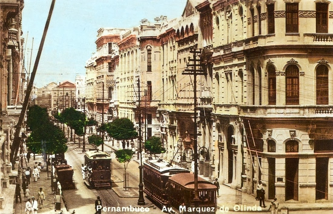 Avenida Marquês de Olinda nos anos 1930 - Recife, Pernambuco, Brasil